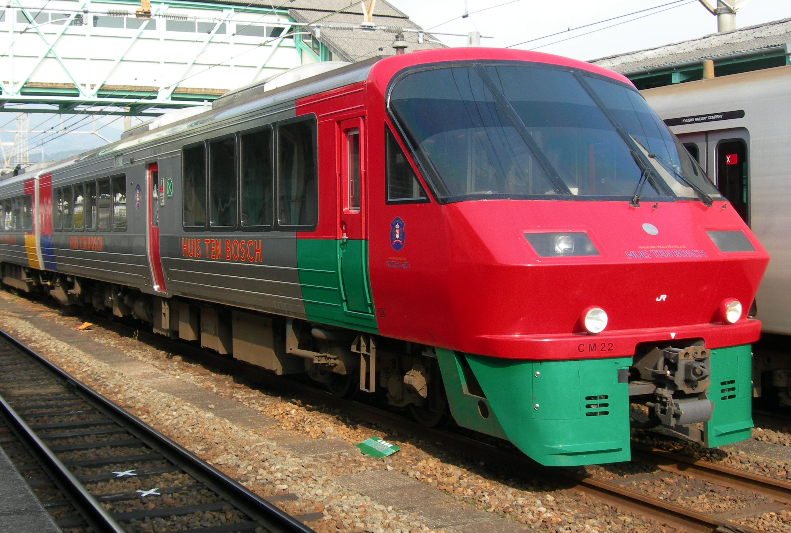 JR九州783系電車クロハ782形500番台